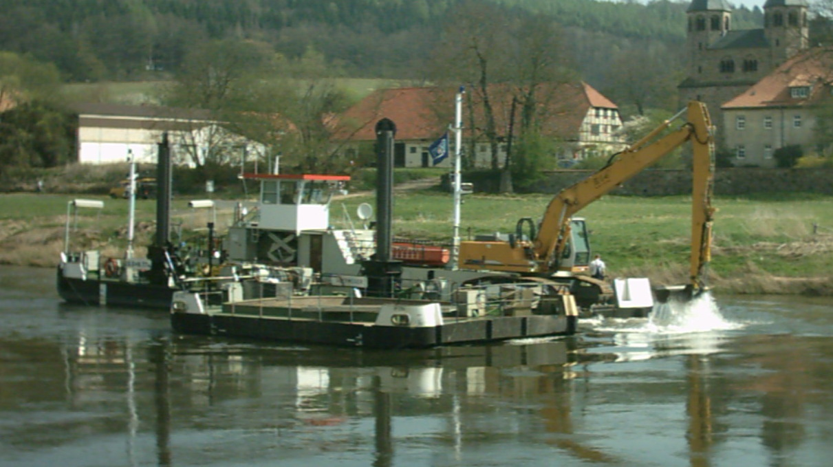 Baggerschiff "Oberweser" auf der Weser vor Kloster Bursfelde